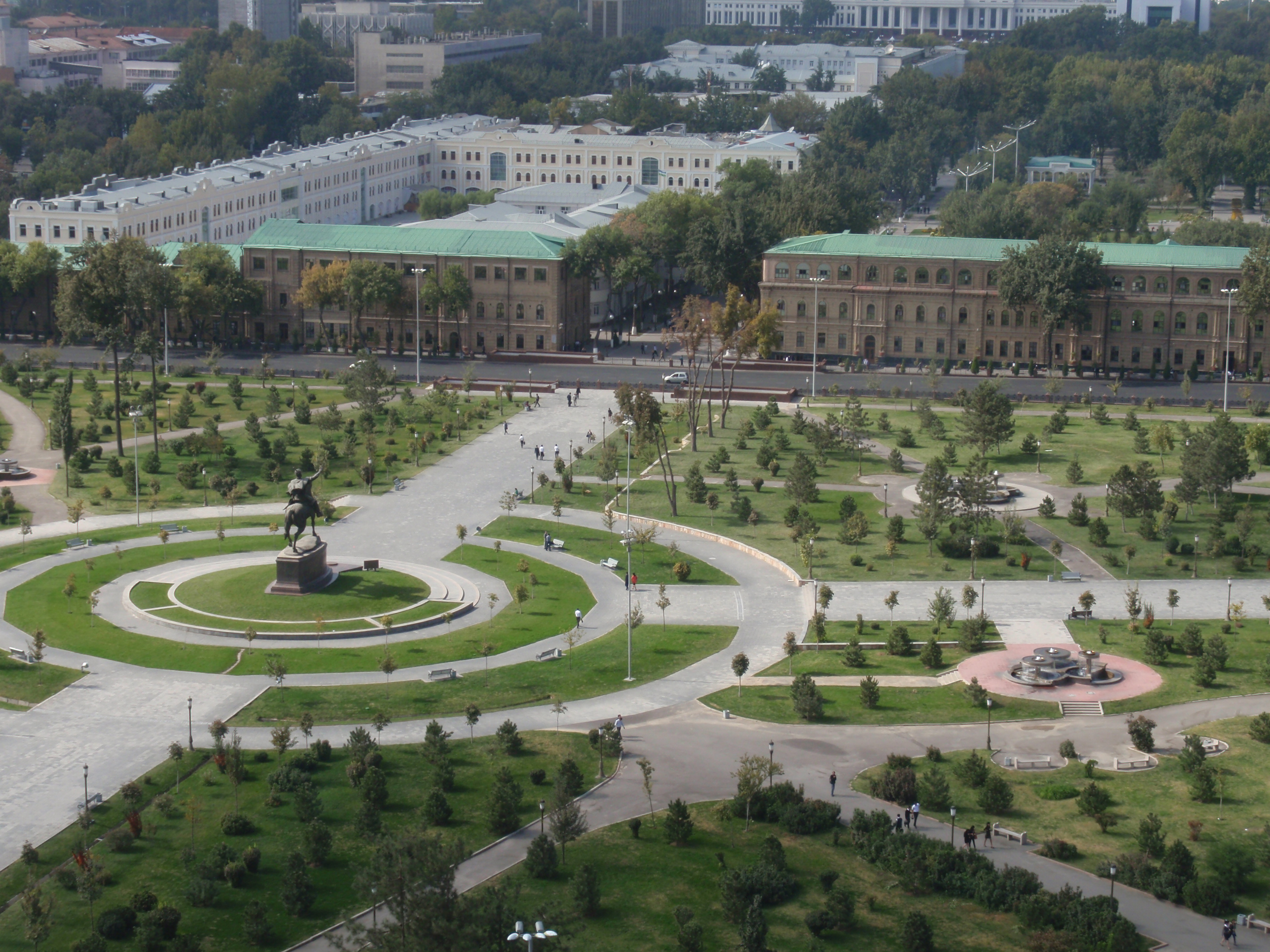 Blick über den Amir-Timur-Platz in Taschkent vom Dach des Usbekistan-Hotels in westlicher Richtung